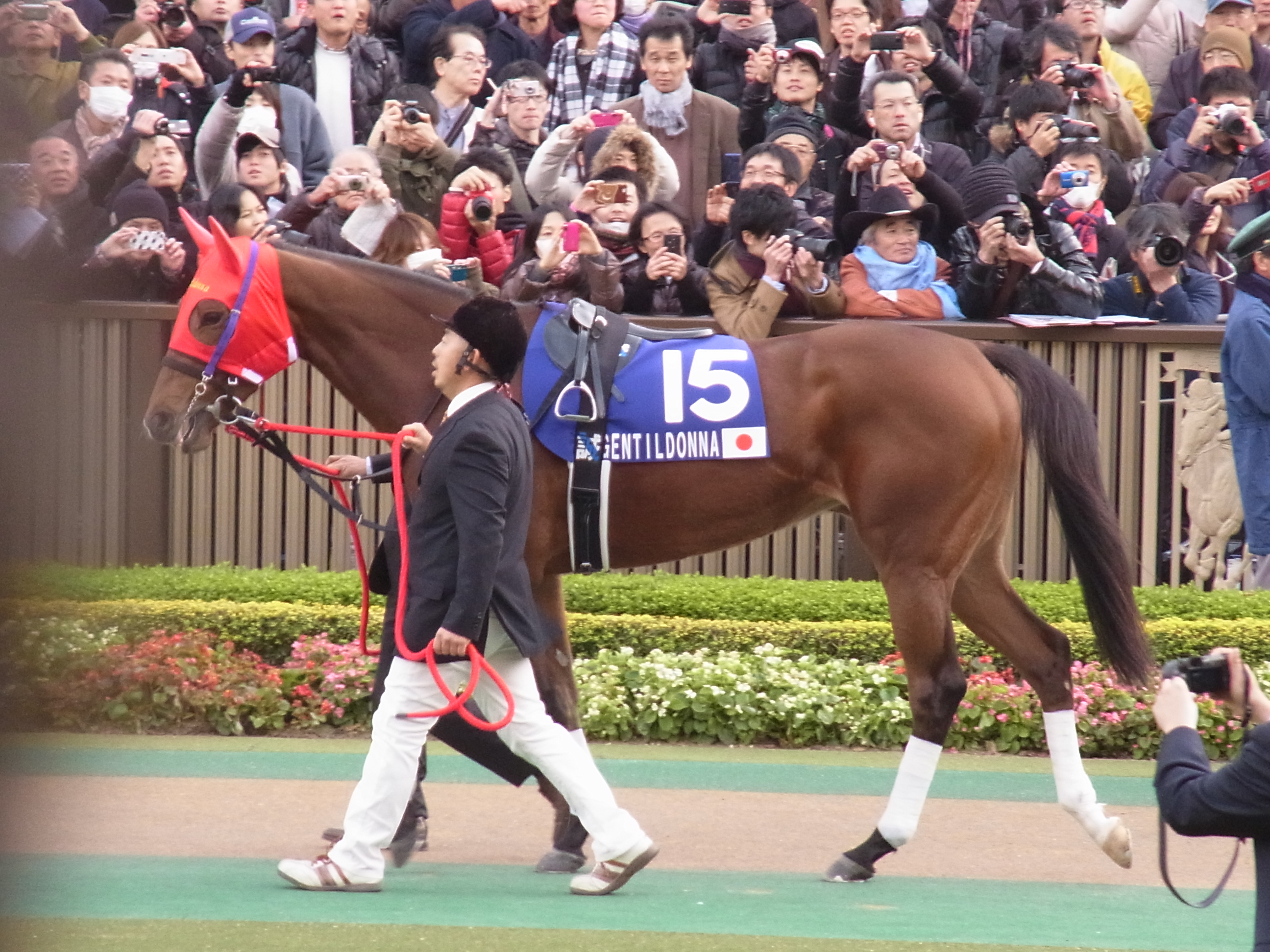 Gentildonna, winner of the 2012 Japan Cup 2012年 11月25日（日） 5回東京8日, ジェンティルドンナ 11R 第32回 ジャパンカップ(ＧＩ) サラ系3歳以上 オープン （国際）（指定） 定量2400m 芝・左